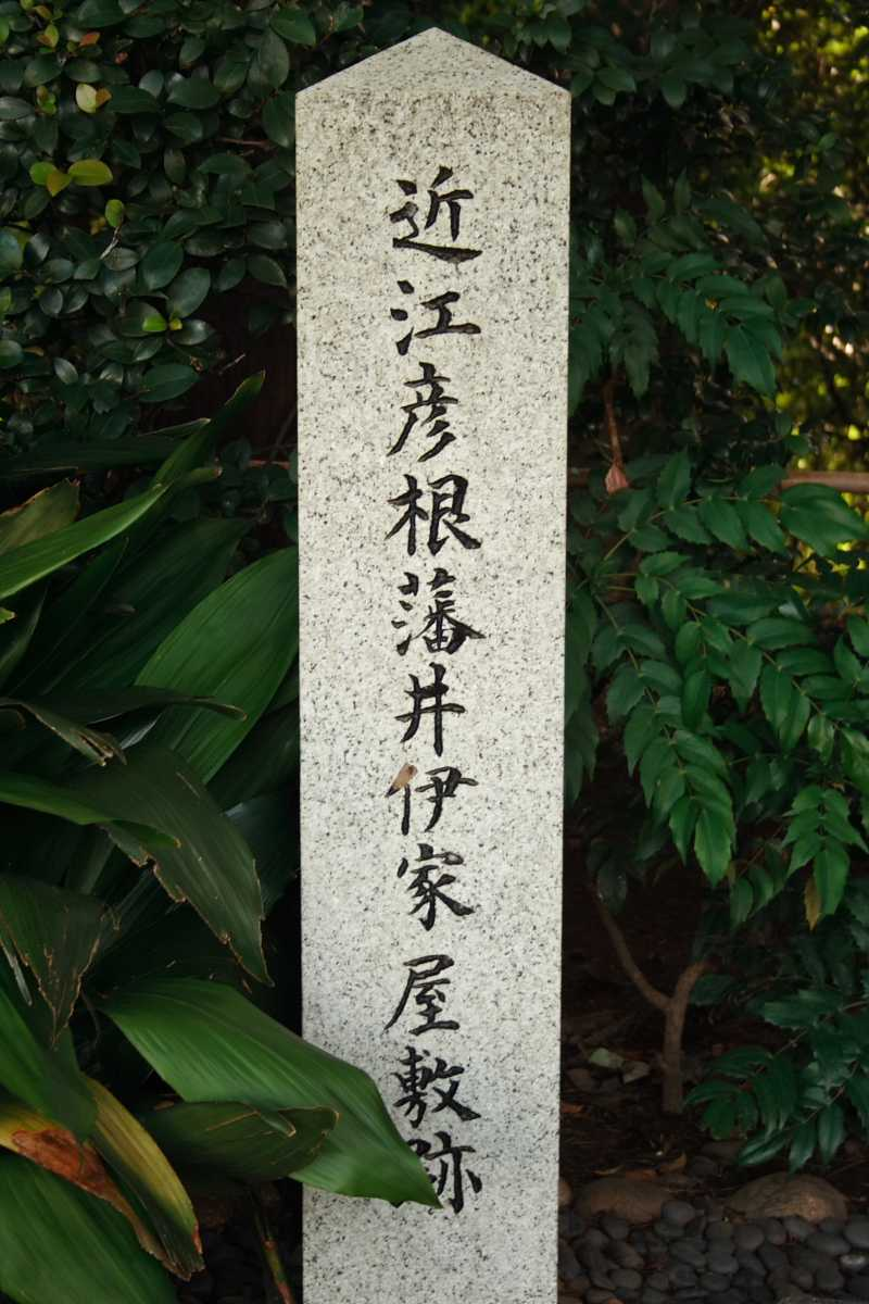 近江彦根藩井伊家屋敷跡のja:石碑 写真 Hadge撮影 2006年08月17日 東京 Category:史跡の画像 Category:石碑画像 Category:千代田区の画像